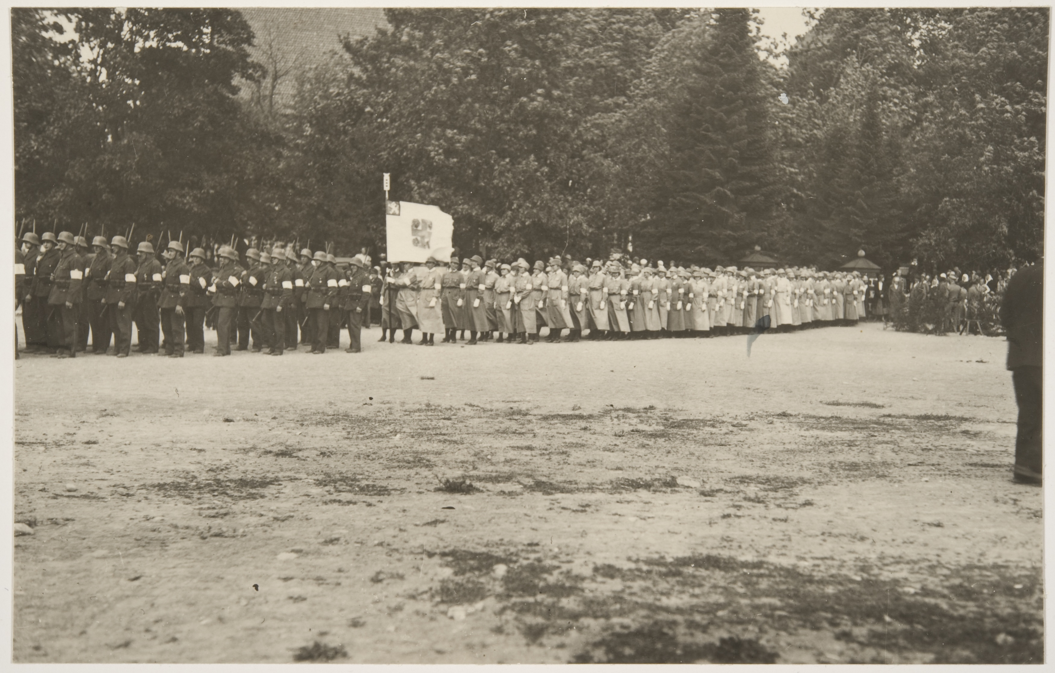 Lohjan suojeluskuntalaiset ja lotat yhteisparaatissa